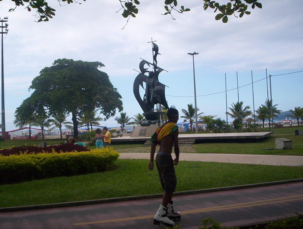 Estatua de Cristovão Colombo